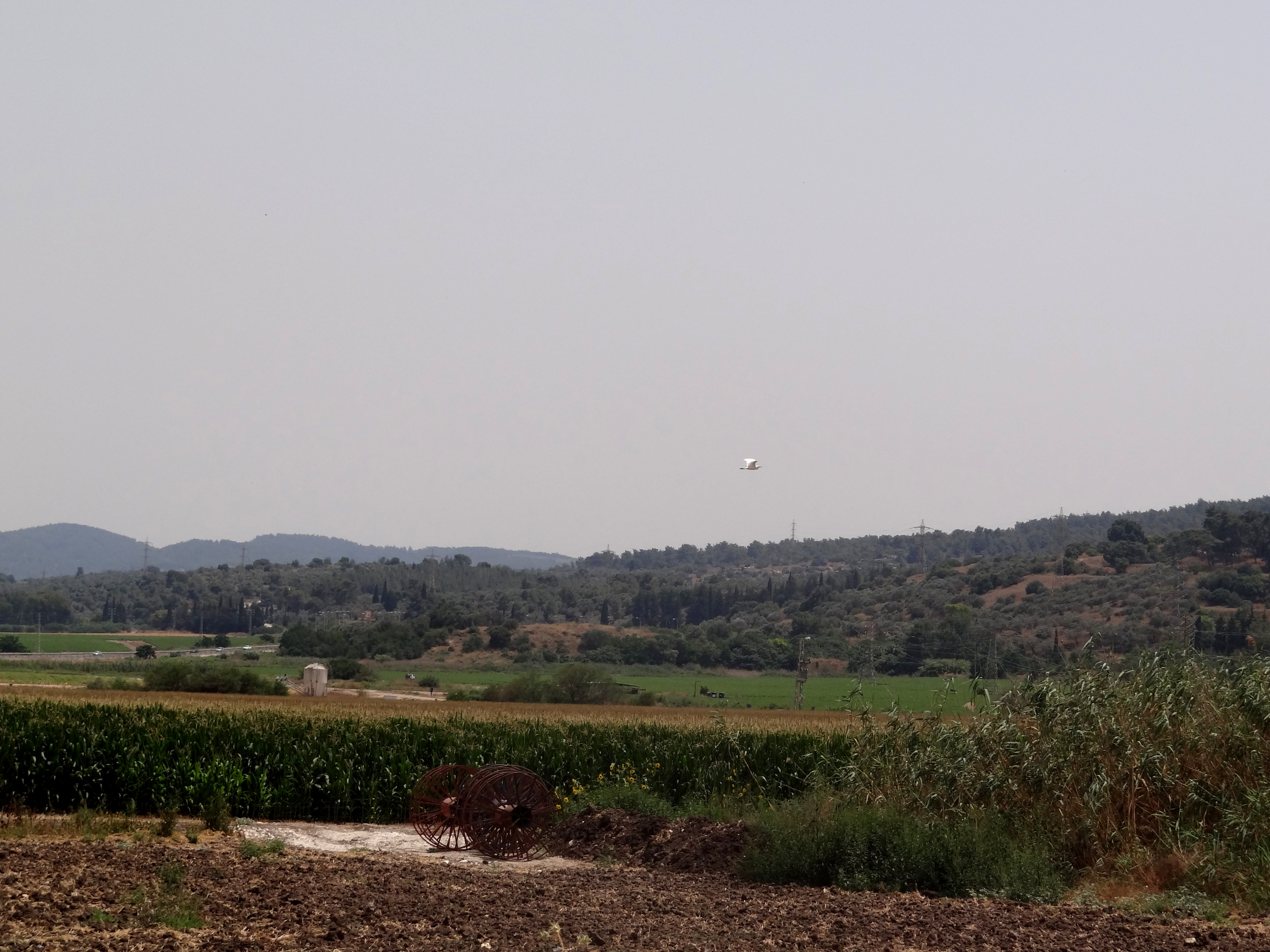 תל זריק אתר ארכאולוגי ליד קיבוץ הזורע בעמק יזרעאל